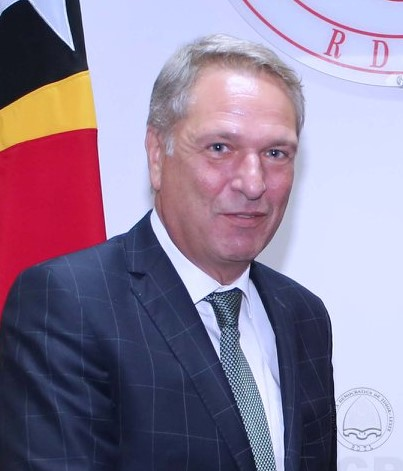 Rob Swartbol, niederländischer Botschafter in Indonesien und Osttimor